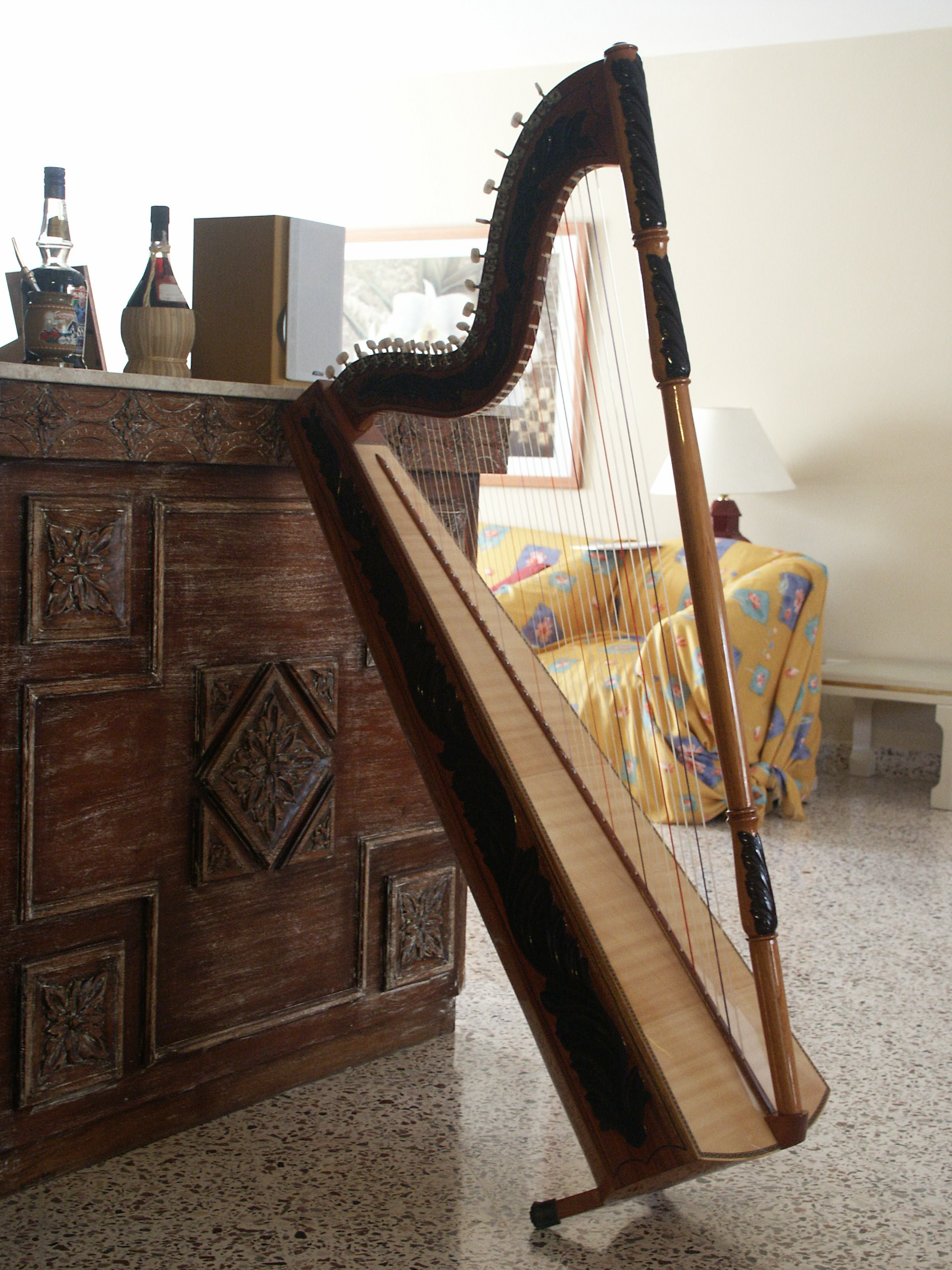 パラグアイで製作された標準的なアルパ